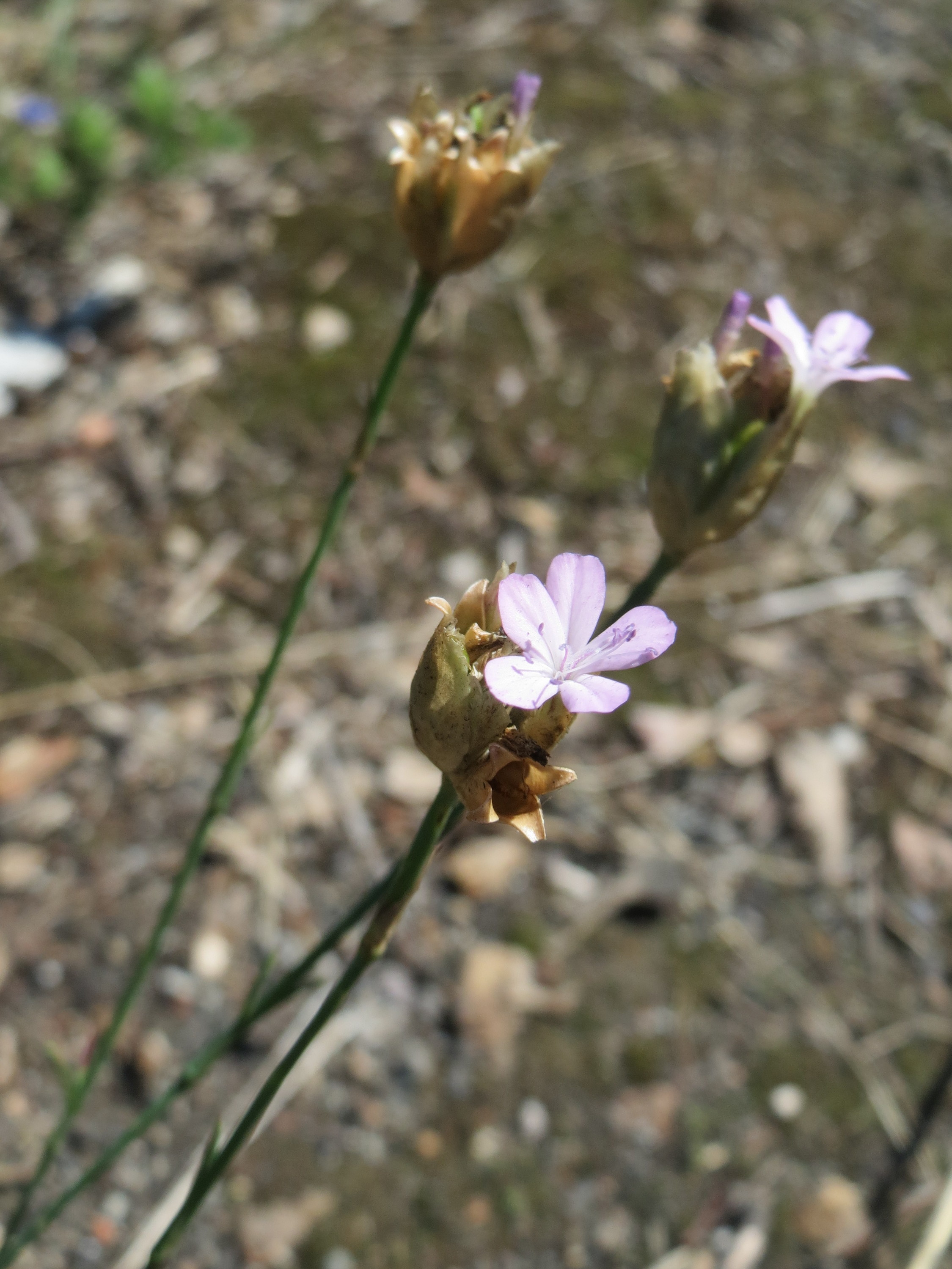 Ritzenbotanik: Sprossende Felsennelke (Petrorhagia prolifera) an der A 620 in Sankt Arnual